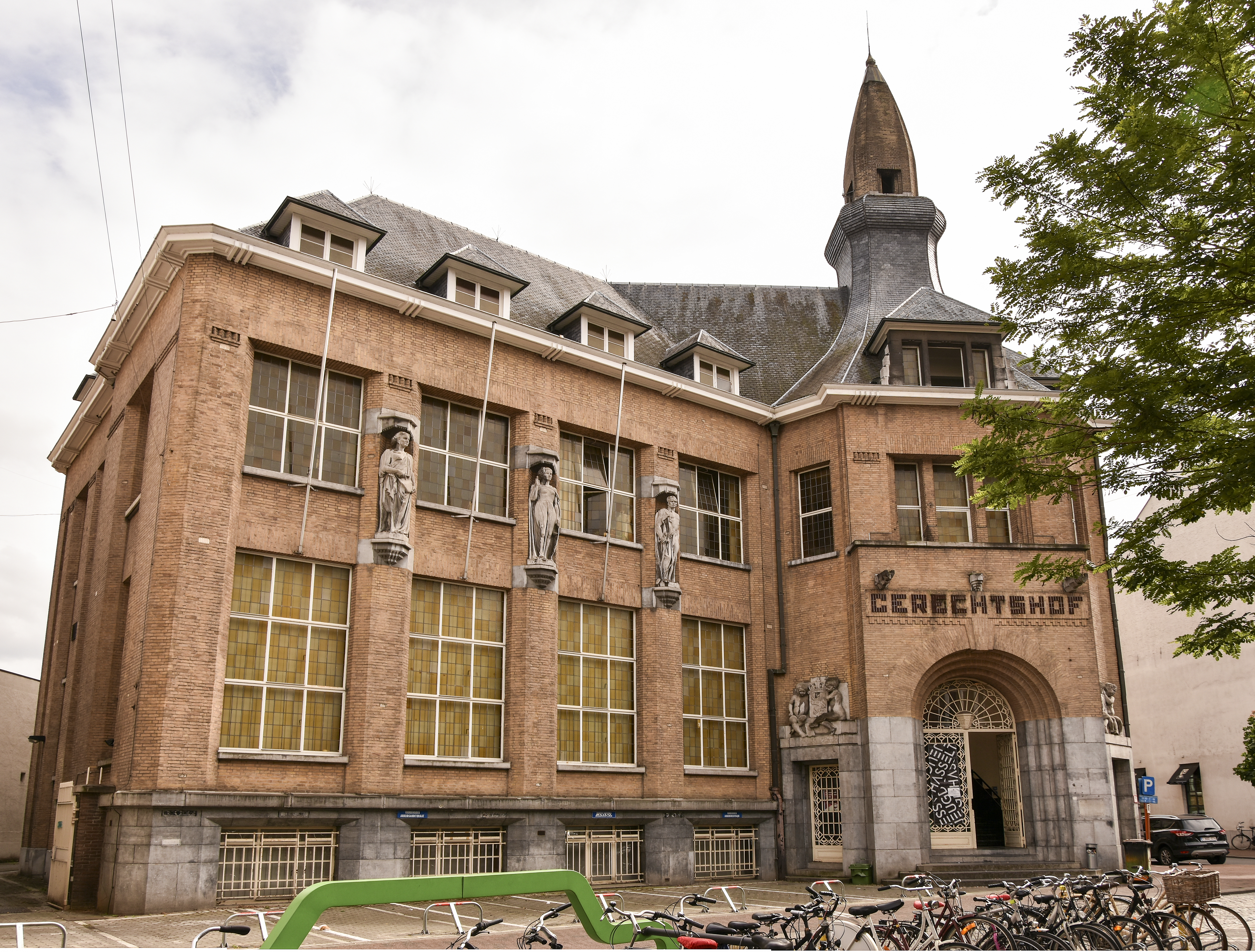 Oud gerechtshof Hasselt 17-06-2018 This photo of immovable heritage has been taken in the Flemish Region